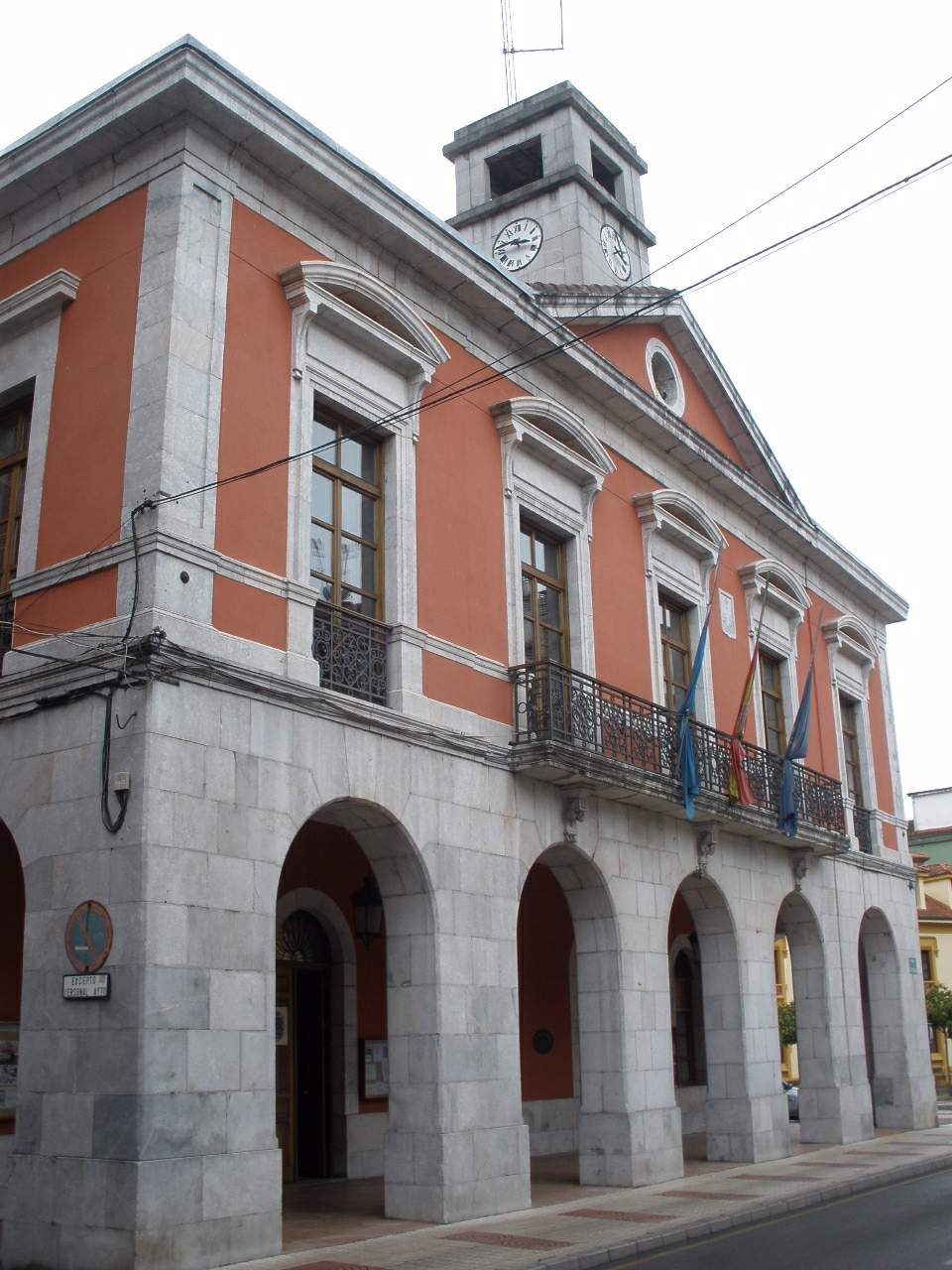 Ayuntamiento de Piloña, en Infiesto (Asturias)